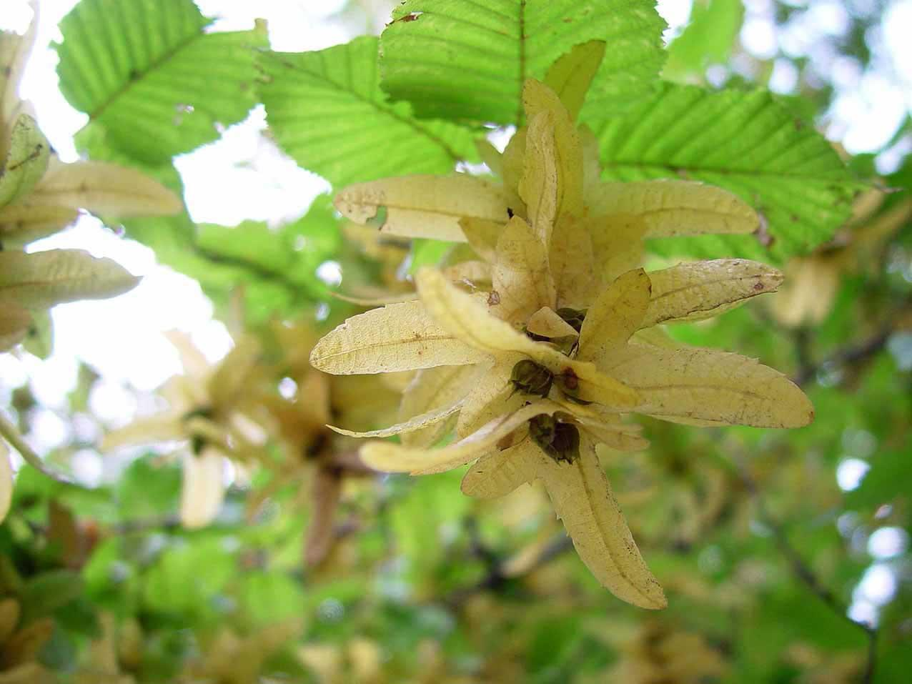 Beschreibung: Früchte der Hainbuche Aufnahmedatum: 14. September 2002 Fotograf: ArtMechanic